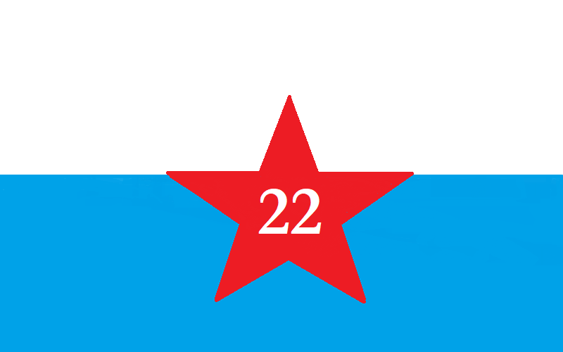 Bandera usada por el grupo guerrillero ERP-22 de agosto